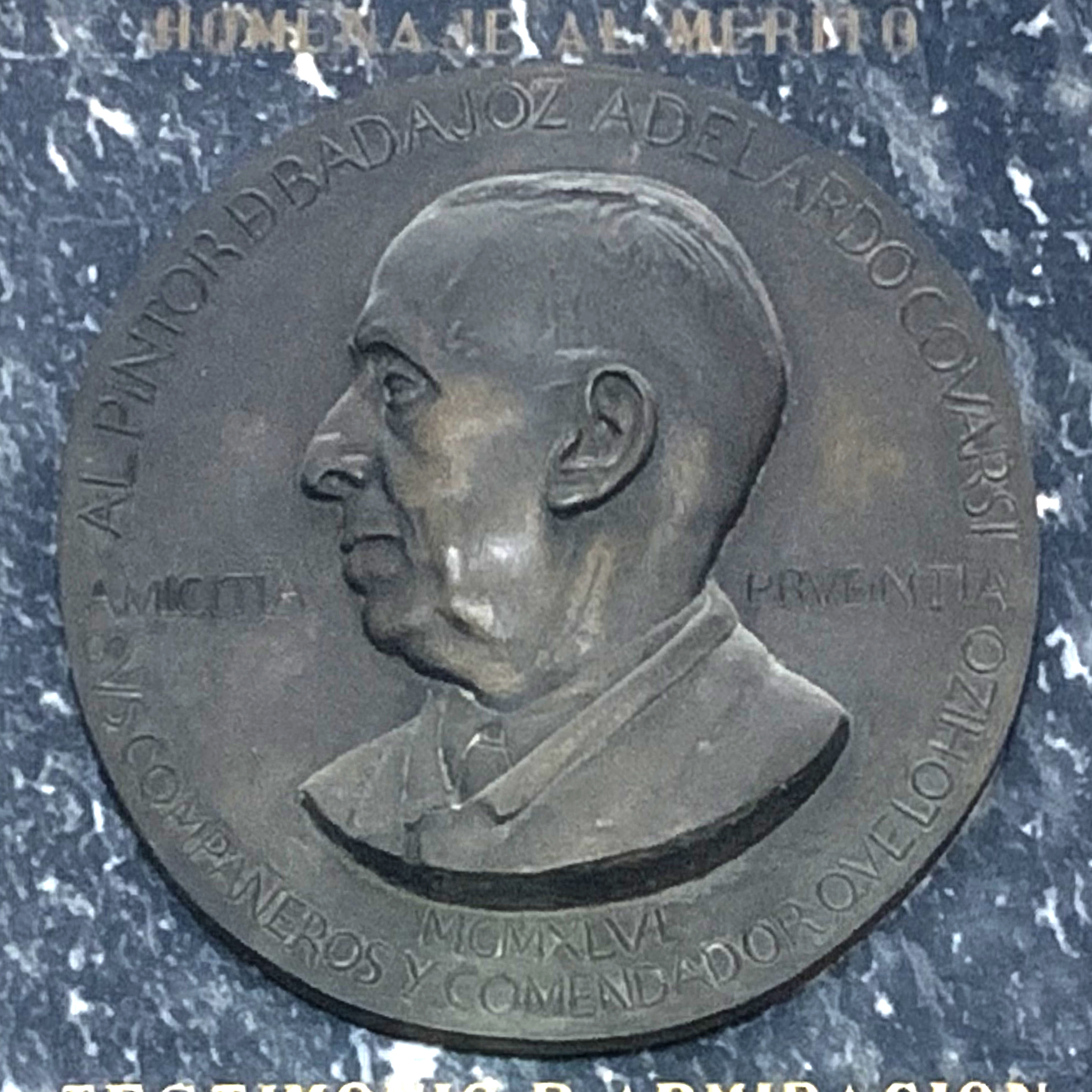 Placa conmemorativa realizada con motivo del nombramiento de Adelardo Covarsí como hijo predilecto de Badajoz por acuerdo municipal de 8 de enero de 1947. Detalle del relieve. Enrique Pérez Comendador (1900–1981) Alternative names Enrique Aniano Pérez Comendador; Aniano Pérez Comendador; Enrique Perez Comendador; Enrique Aniano Perez Comendador; Aniano Perez ComendadorDescriptionSpanish sculptorDate of birth/death 17 November 1900 2 March 1981Location of birth/death Hervás MadridAuthority control : Q5833712 VIAF: 20488431 ISNI: 0000 0001 2123 340X ULAN: 500037868 LCCN: no95008170 GND: 119332310 WorldCat creator QS:P170,Q5833712